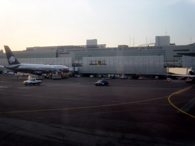 Este es un avion boeing 757-200 de aeromexico en el aeropuertoo internacionald de la ciudad de mexico la tome de [1], donde dice que fue tomada e diciembre 2005.